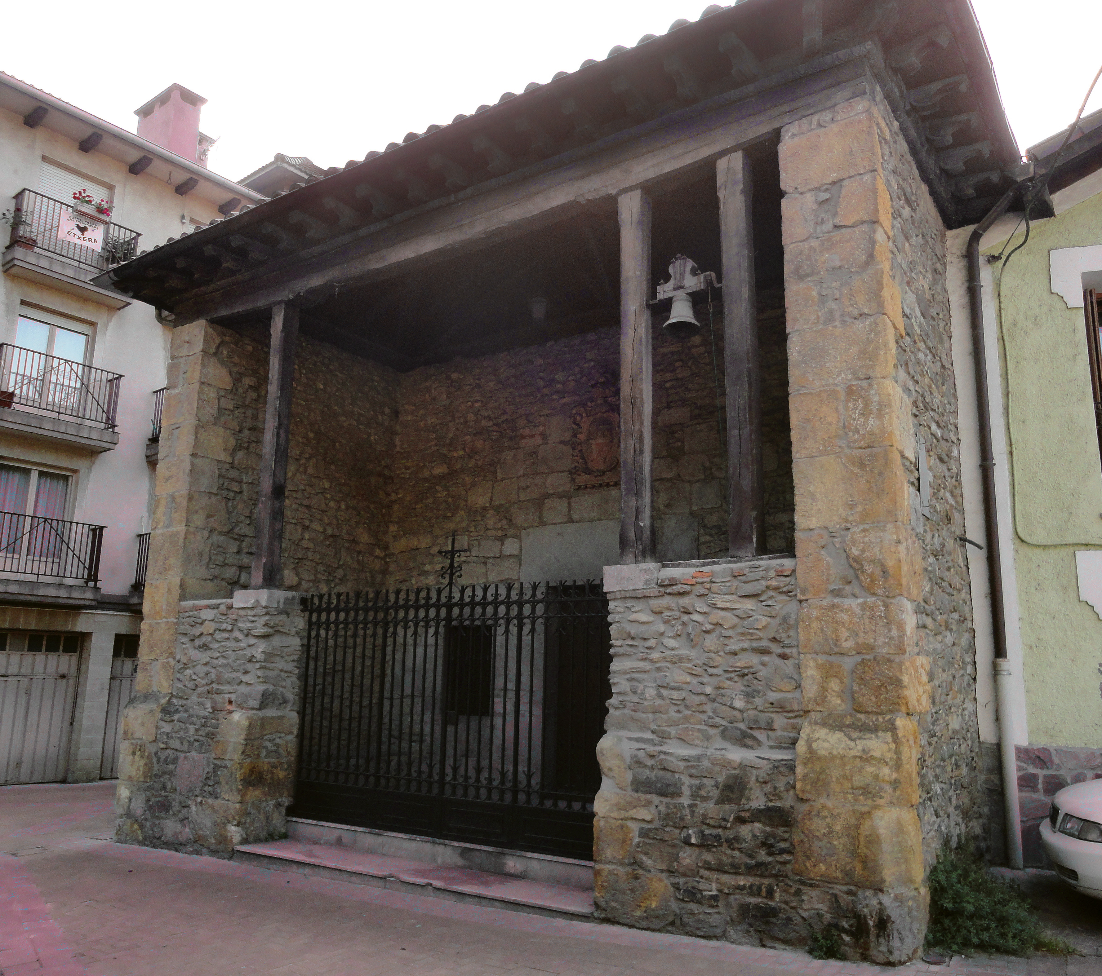 Santo Cristo ermita - Alegia